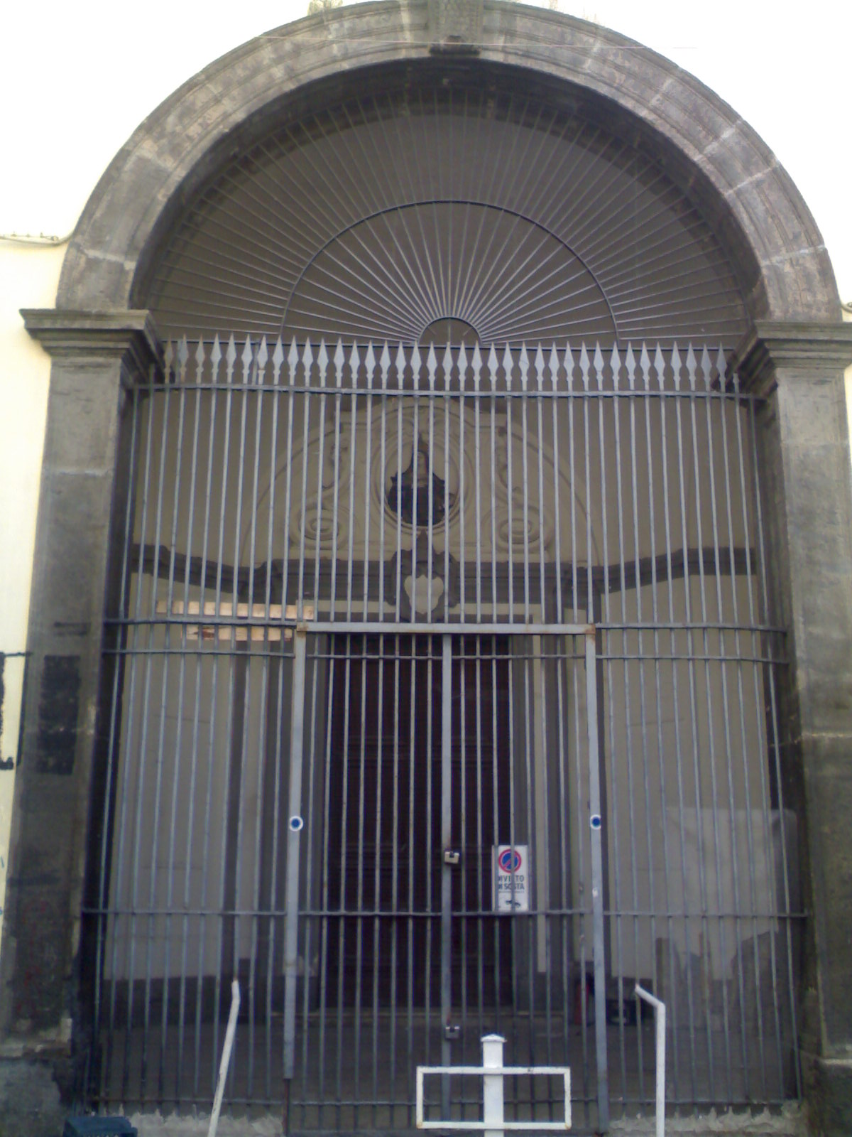 Chiesa di Santa Patrizia (Napoli)